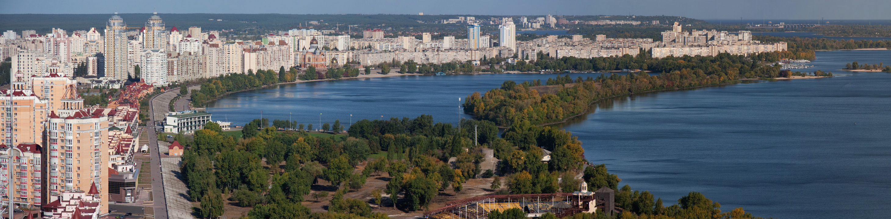 Вид на Оболонь (Киев)